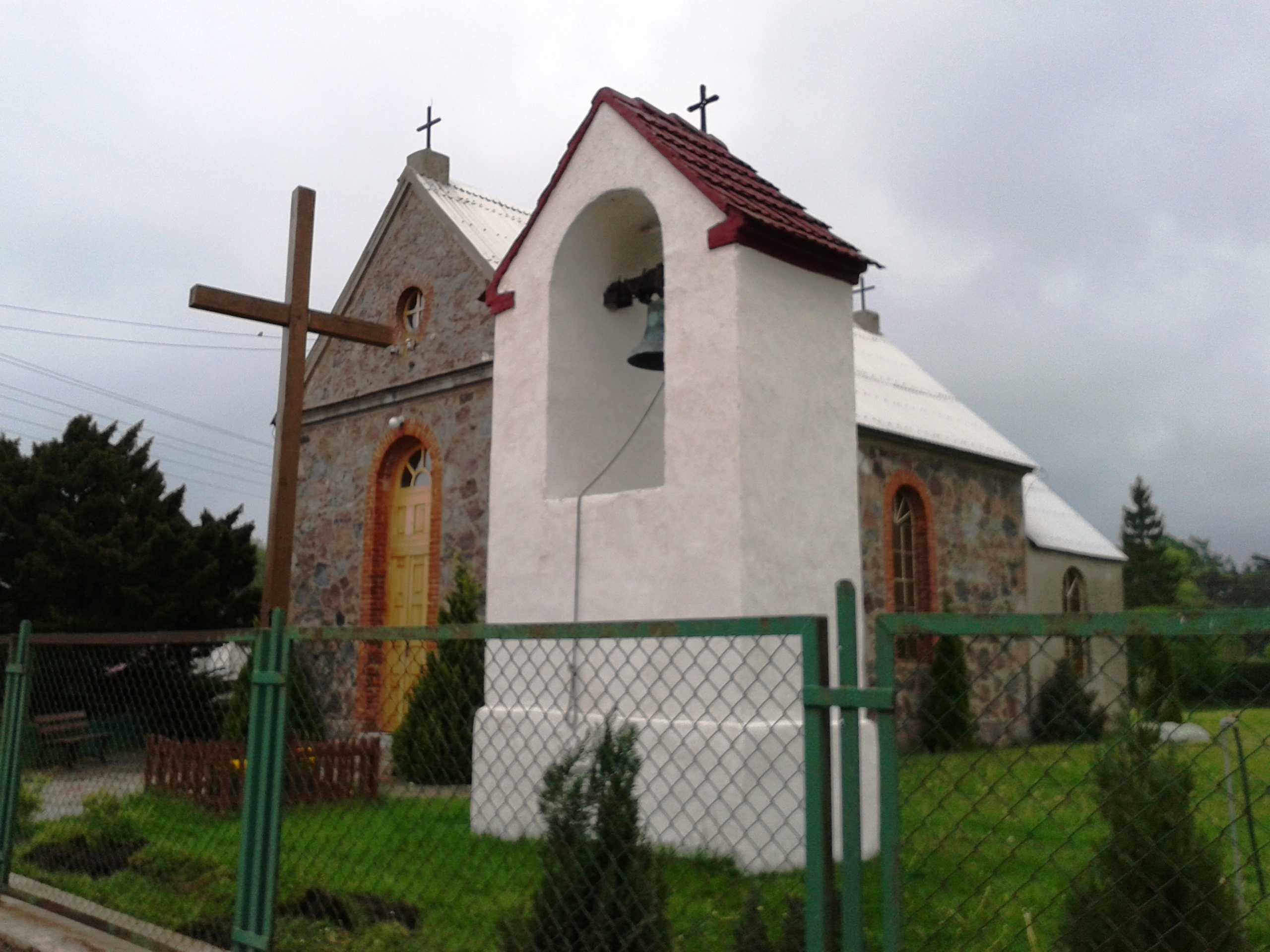 Zagórzyce - rzymskokatolicki kościół filalny p.w. Św. Marcina Biskupa